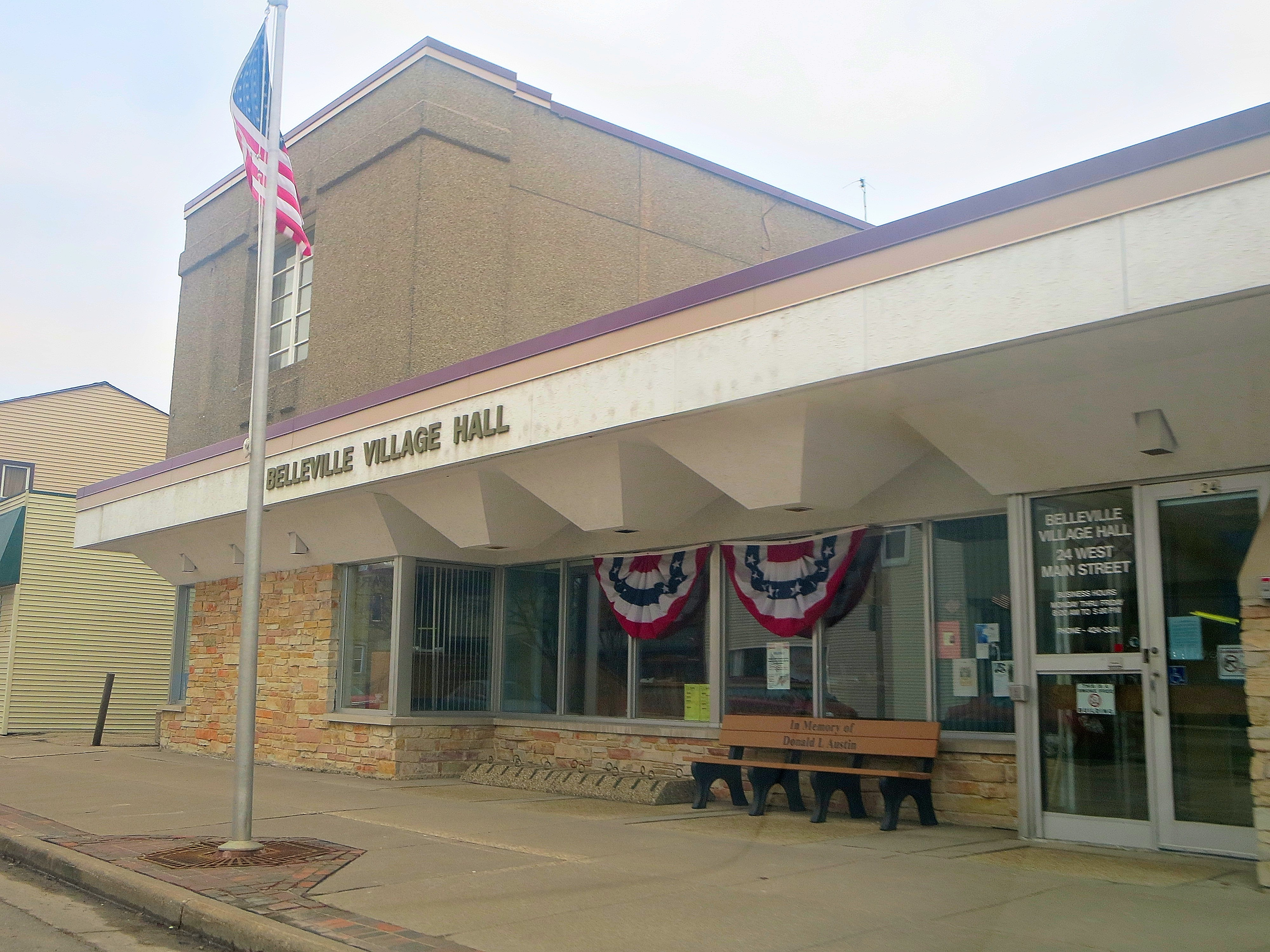 Belleville Village Hall